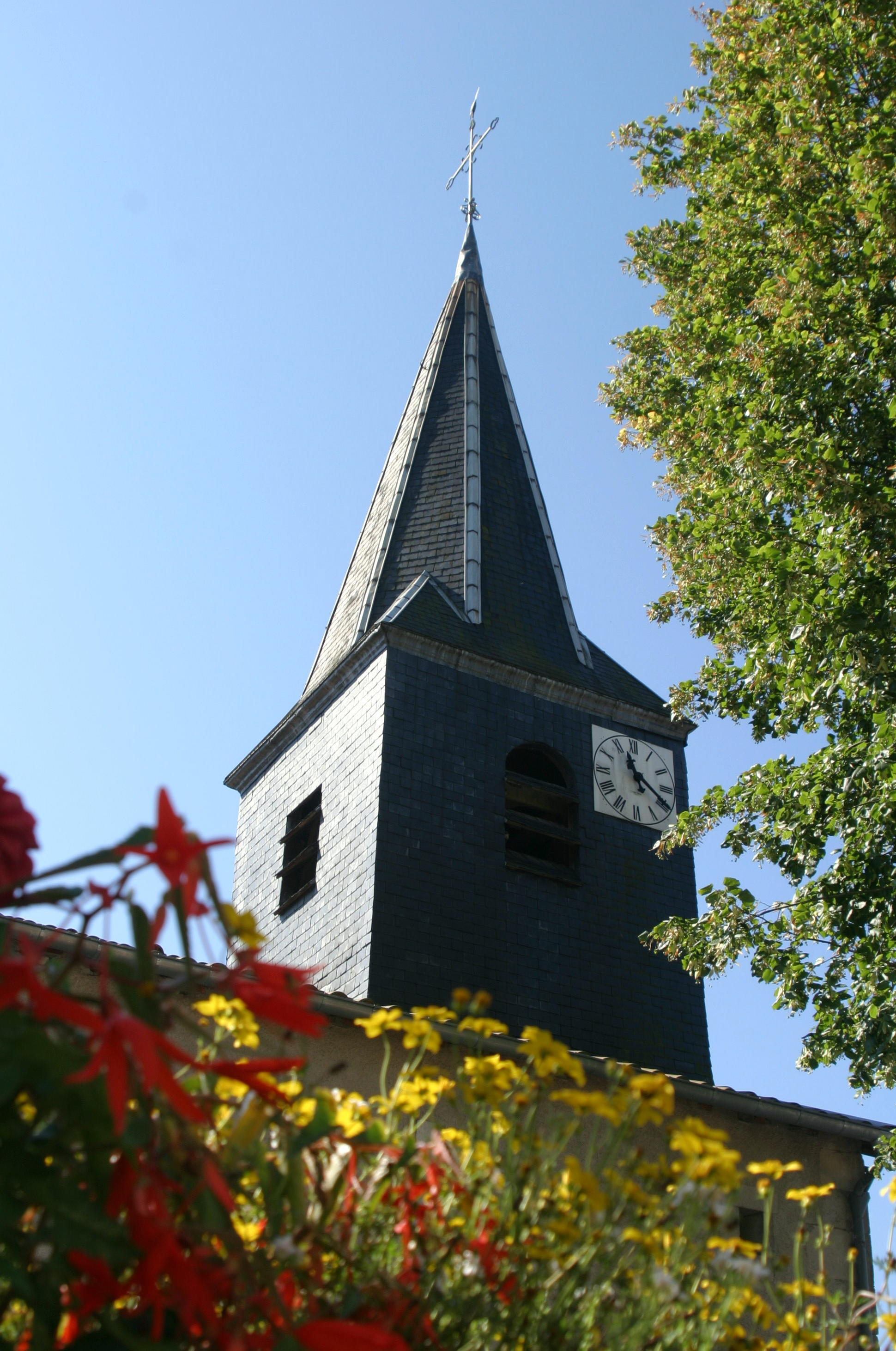 2 cadrans situés dans l'angle NO du clocher.